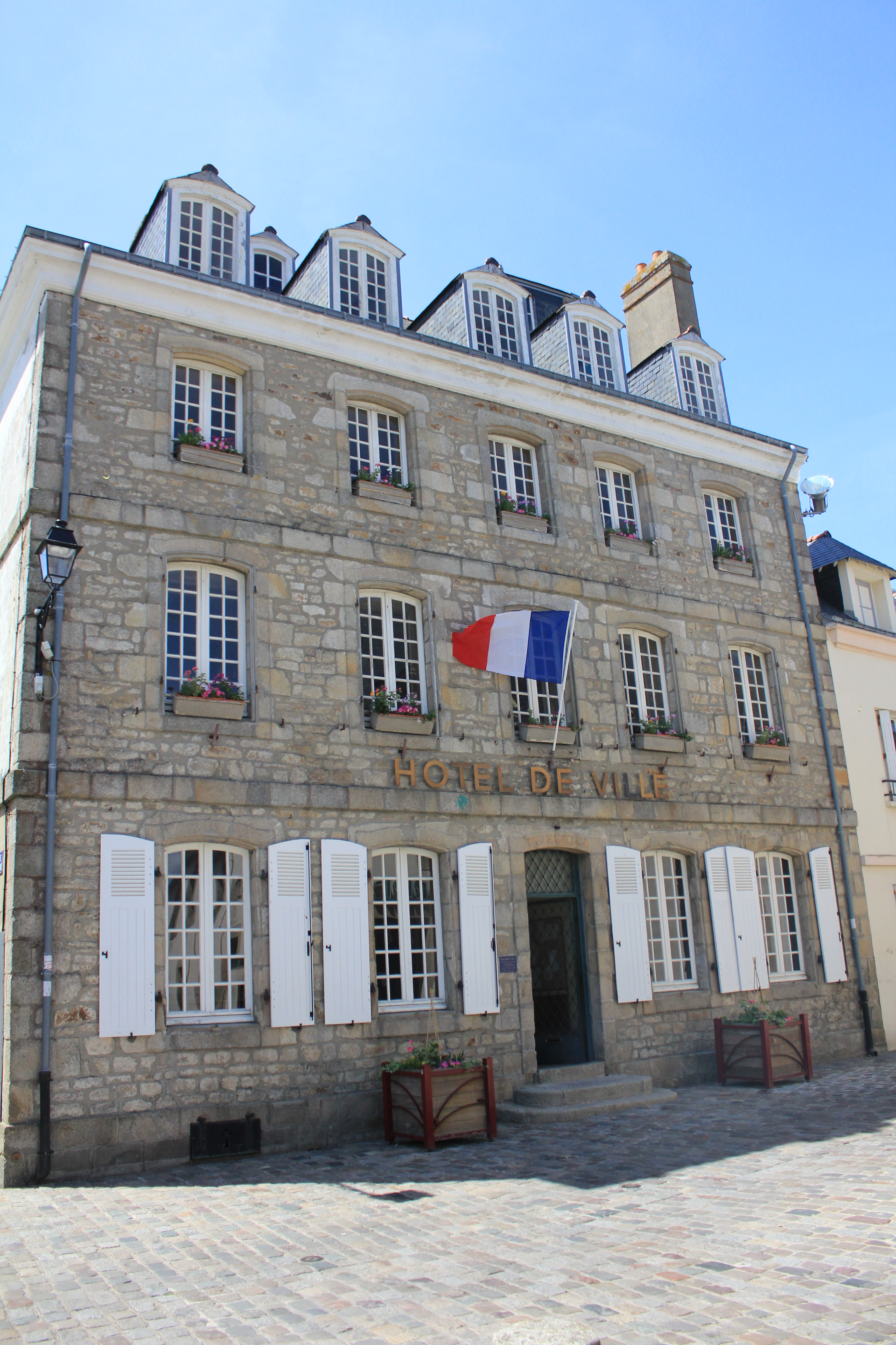 Mairie à Port-Louis, Morbihan, France .